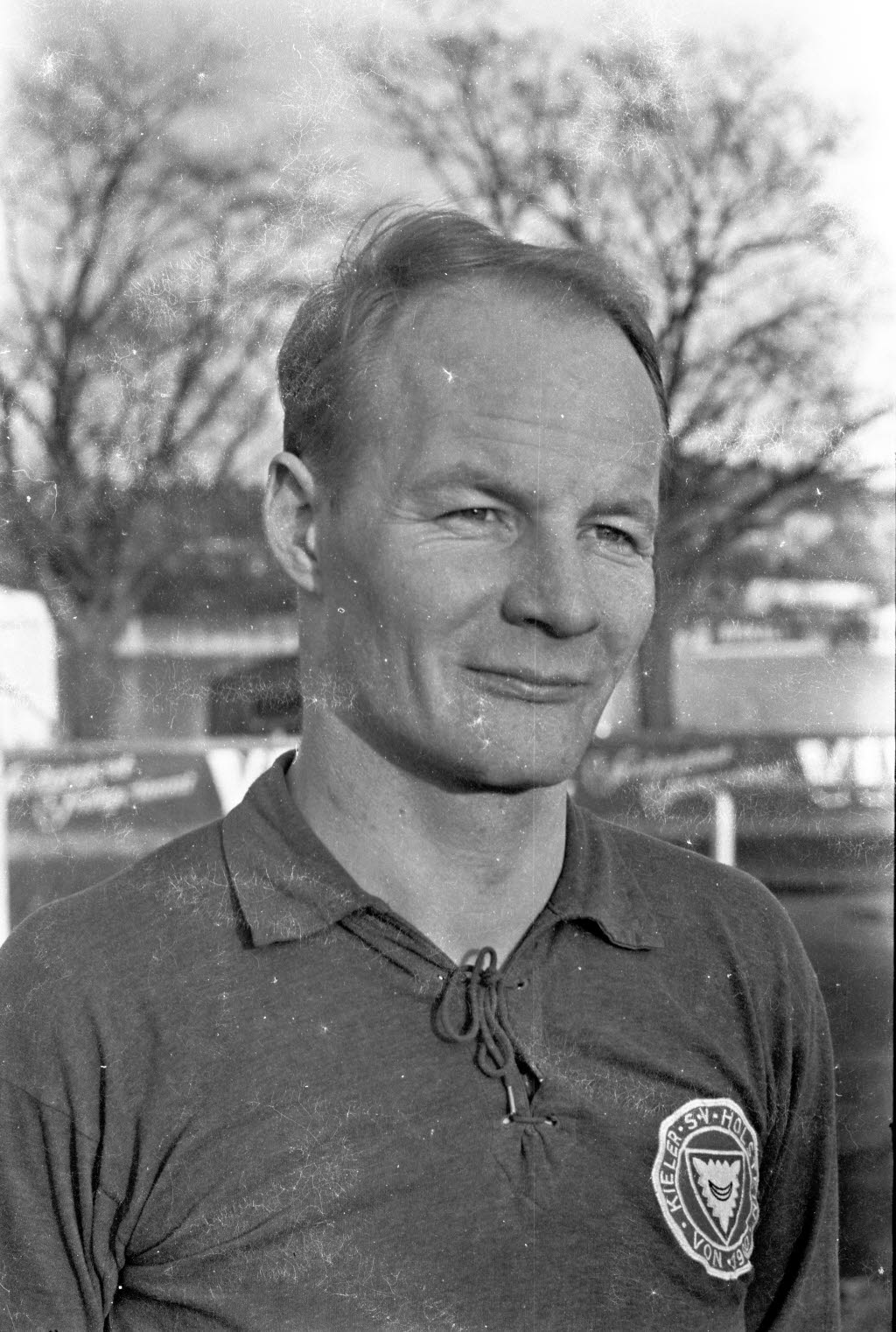 Fußballspieler von Holstein Kiel in der Saison 1964/1965.